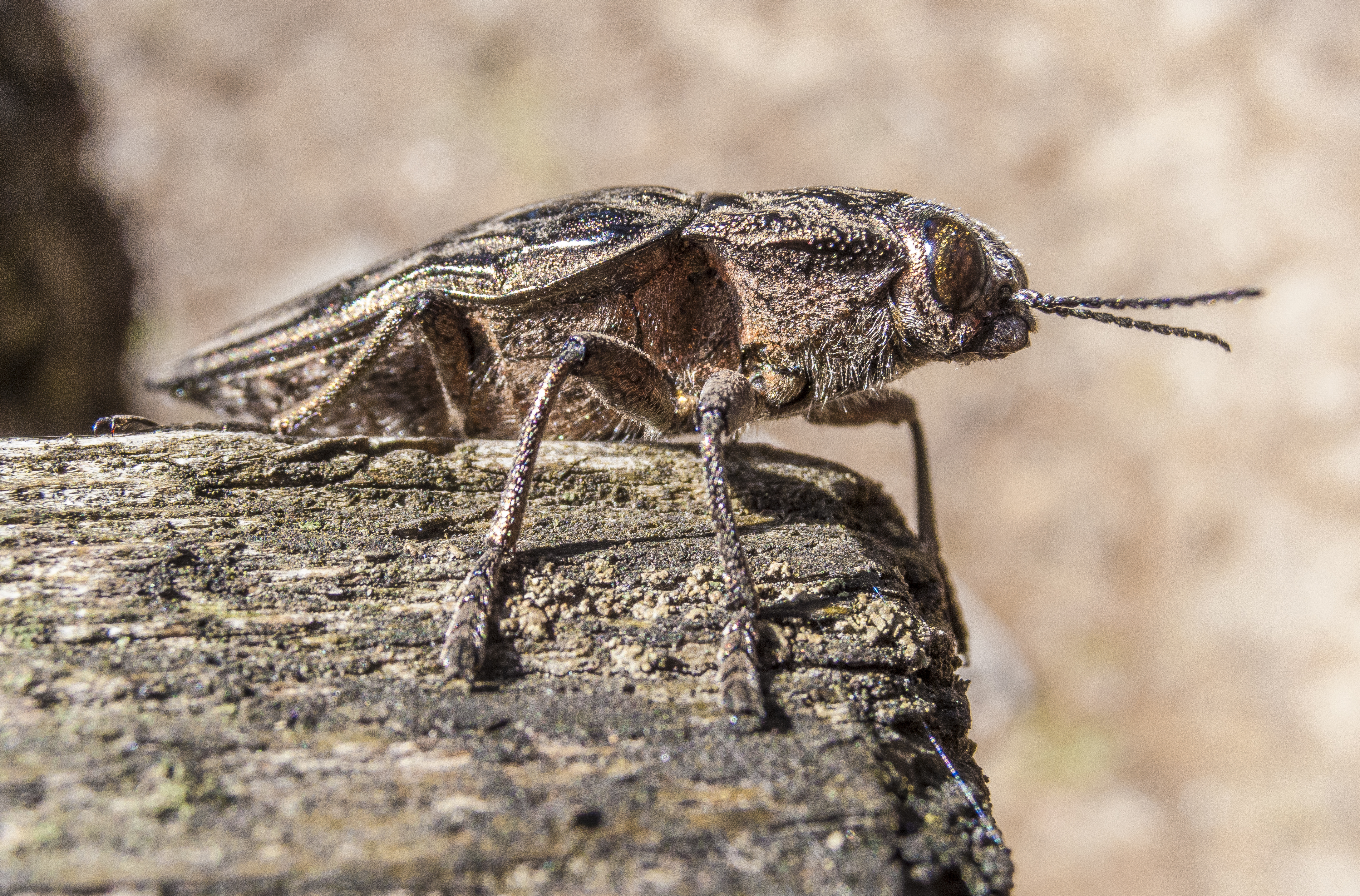 Chalcophora mariana на пожарище в сосновом лесу. В районе Быковни (окрестности Киева).